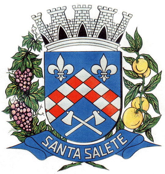 Brasão_do_Municipio_de_Santa_Salete-SP